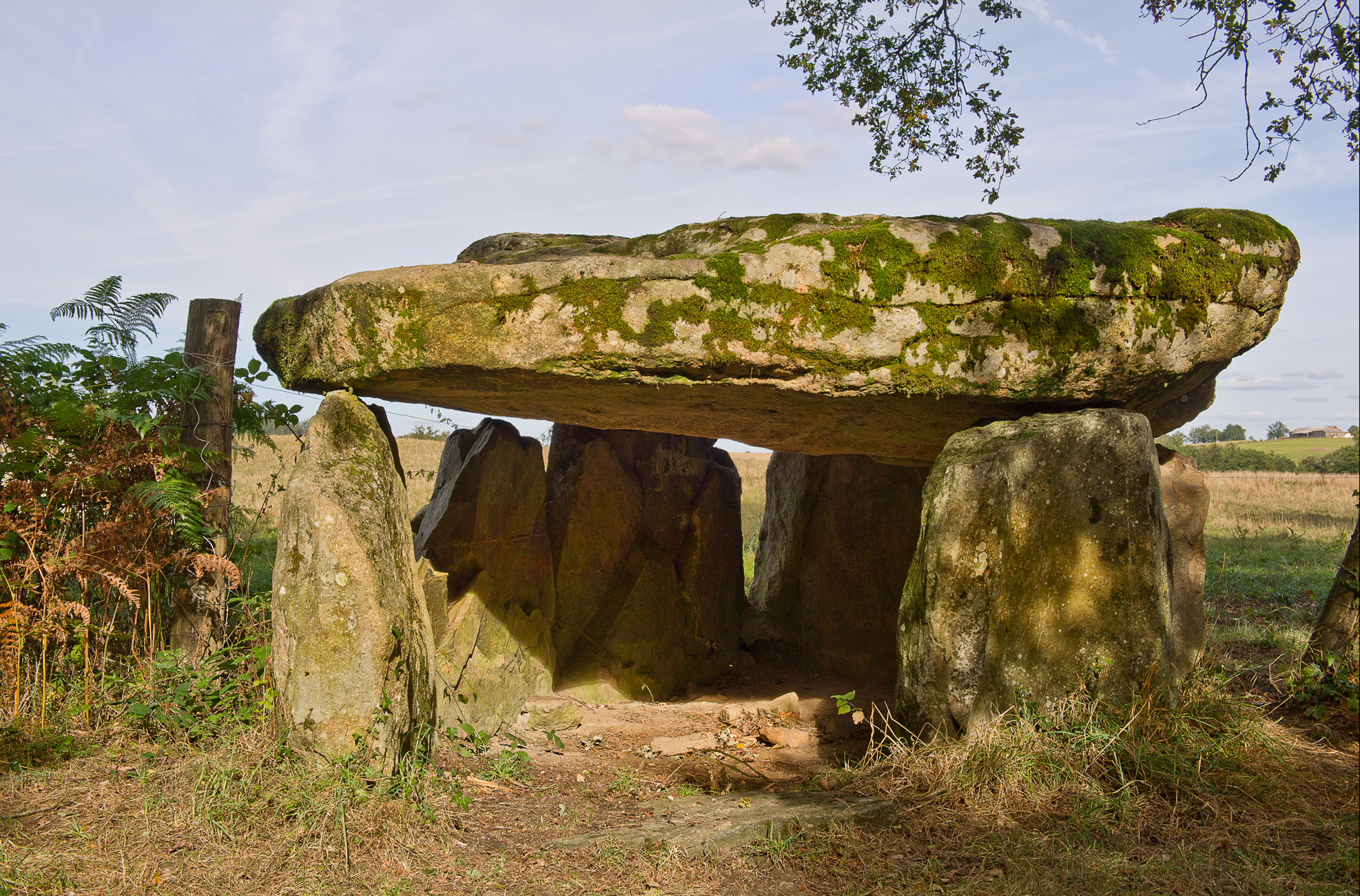 Dolmen de la Betoulle (no 2), La Pierre Levée (Inscrit, 1982) .